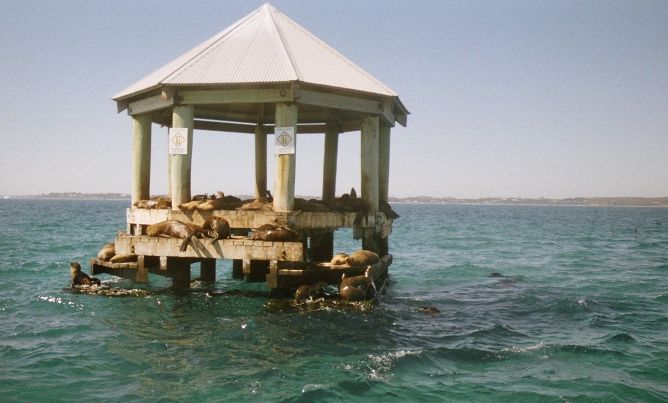 Chinaman's hat.